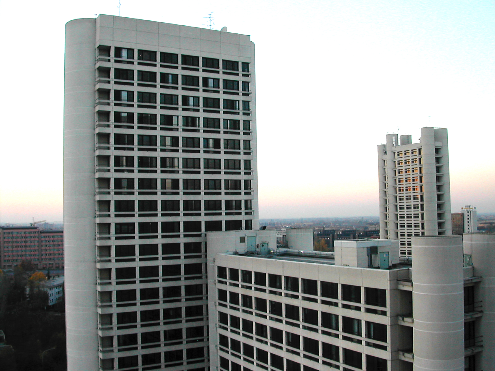 sede dell'ente Regione Emilia-Romagna a Bologna